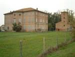 Villa facci novi di modena